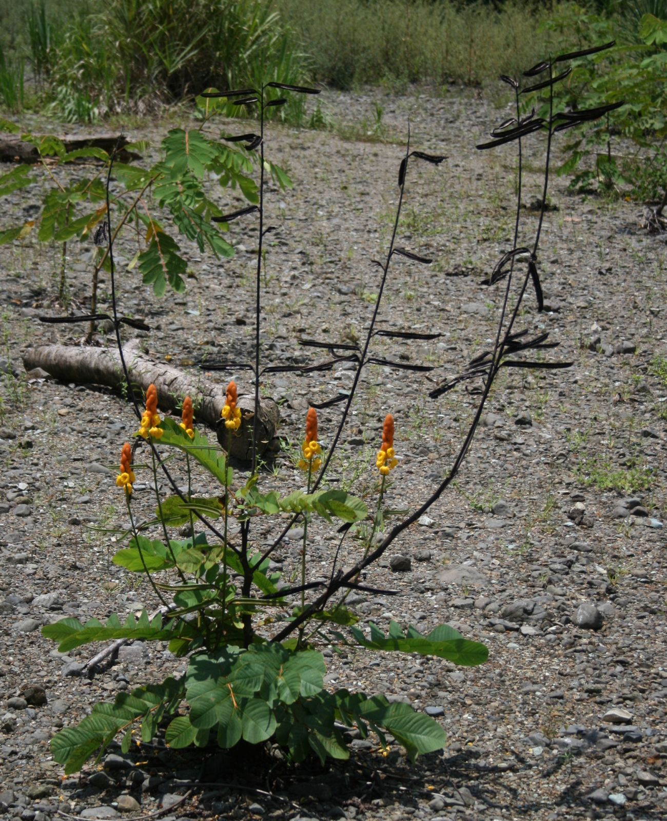 Senna alata, Hülsenfrüchtler (Fabaceae), Caesalpinioideae - Costa Rica: Prov. Puntarenas, La Gamba NW Golfito, Valle Bonito